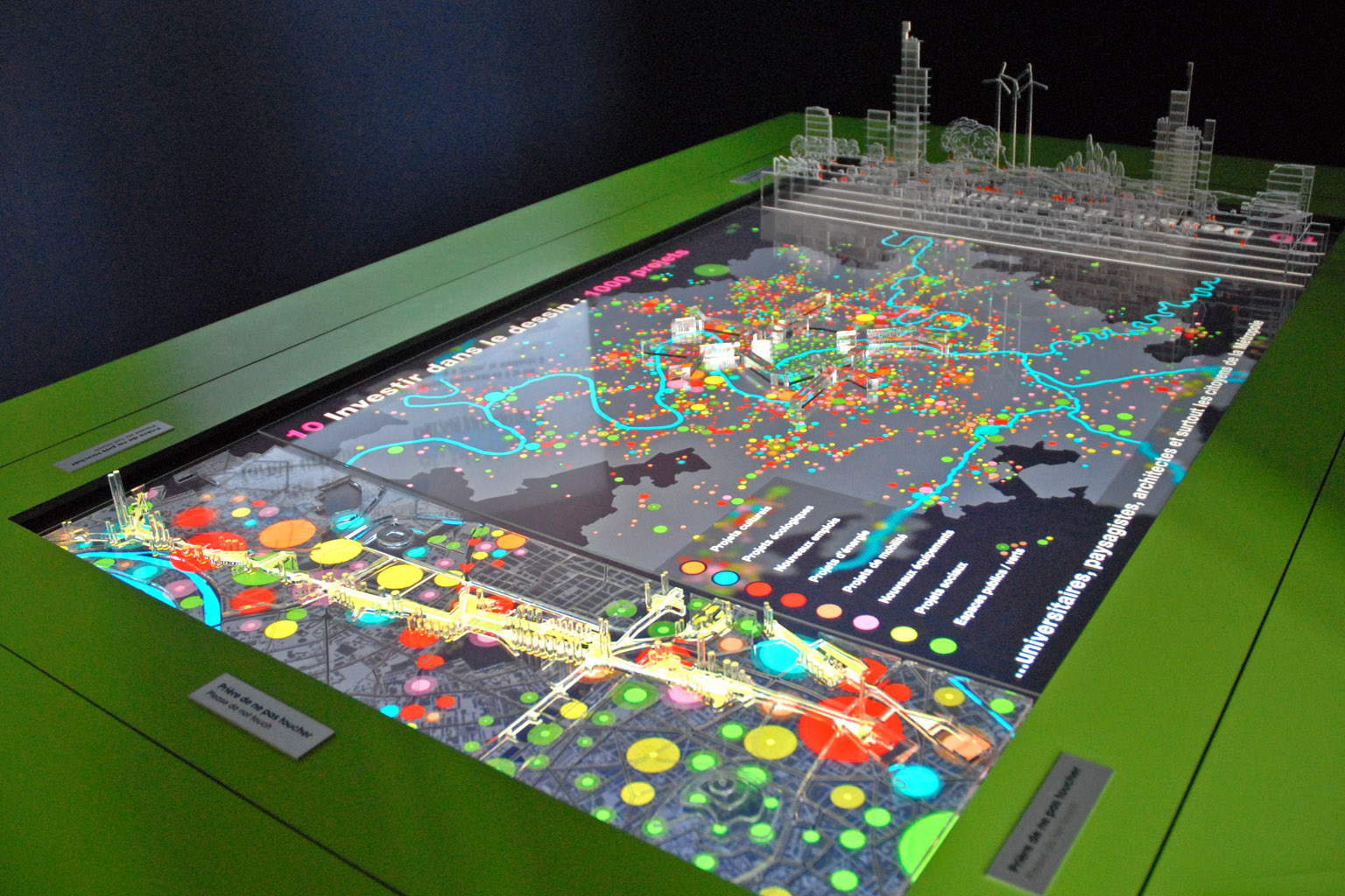 Le Grand Pari(s) Consultation internationale de recherche et développement à la Cité de l'architecture et du patrimoine à Paris Une exposition des 10 scénarios pour la métropole parisienne "Le musée de la Cité accueille, au sein de sa collection de moulages de monuments français les 10 projections sur l’avenir du grand Paris. La scénographie signée Jean-Christophe Quinton, lauréat des NAJA 2004, articule 10 modules contemporains dans un parcours historique, laissant à chaque équipe la liberté d’investir son espace pour présenter sa proposition. Soit 10 modes de représentation pour 10 stratégies de recherche et de développement." NDLR : Les modules présentant les propositions des cabinets d'architectes sont bien trop grands pour l'espace muséographique disponible (voir photo de la galerie centrale), il en résulte une impression de confusion et d'entassement qui ne favorise pas la compréhension des projets. Lorsqu'on lit qu'il faut densifier Paris et construire de nouvelles tours, on se demande si les éminents architectes consultés ont déjà pris le métro ou le RER aux heures d'ouverture ou de fermeture des bureaux, notamment sur la ligne 1 ou le RER A qui mène à la Défense et que dire des embouteillages du matin ou du soir partout dans la ville et la banlieue, sans parler des grèves à répétition ou des pannes dans les transports collectifs! Que l'on ne vienne pas nous dire non plus que les prix des appartements à Paris vont baisser et que tout le monde pourra aller à pied à son travail dans des avenues devenues des paradis de verdure ! Qui pourrait croire à ces délires de théoriciens de l'urbanisme. Si c'est le grand Pari(s) qu'ils nous préparent, il vaudra mieux aller vivre ailleurs car il sera encore plus qu'aujourd'hui réservé à une élite sociale.